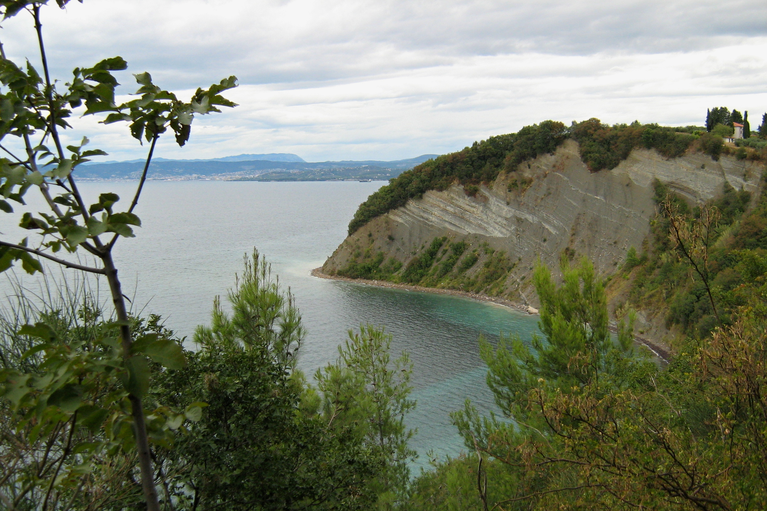 Klif v zálivu sv. Kříže (Měsíční záliv) v přírodní rezervaci Strunjan